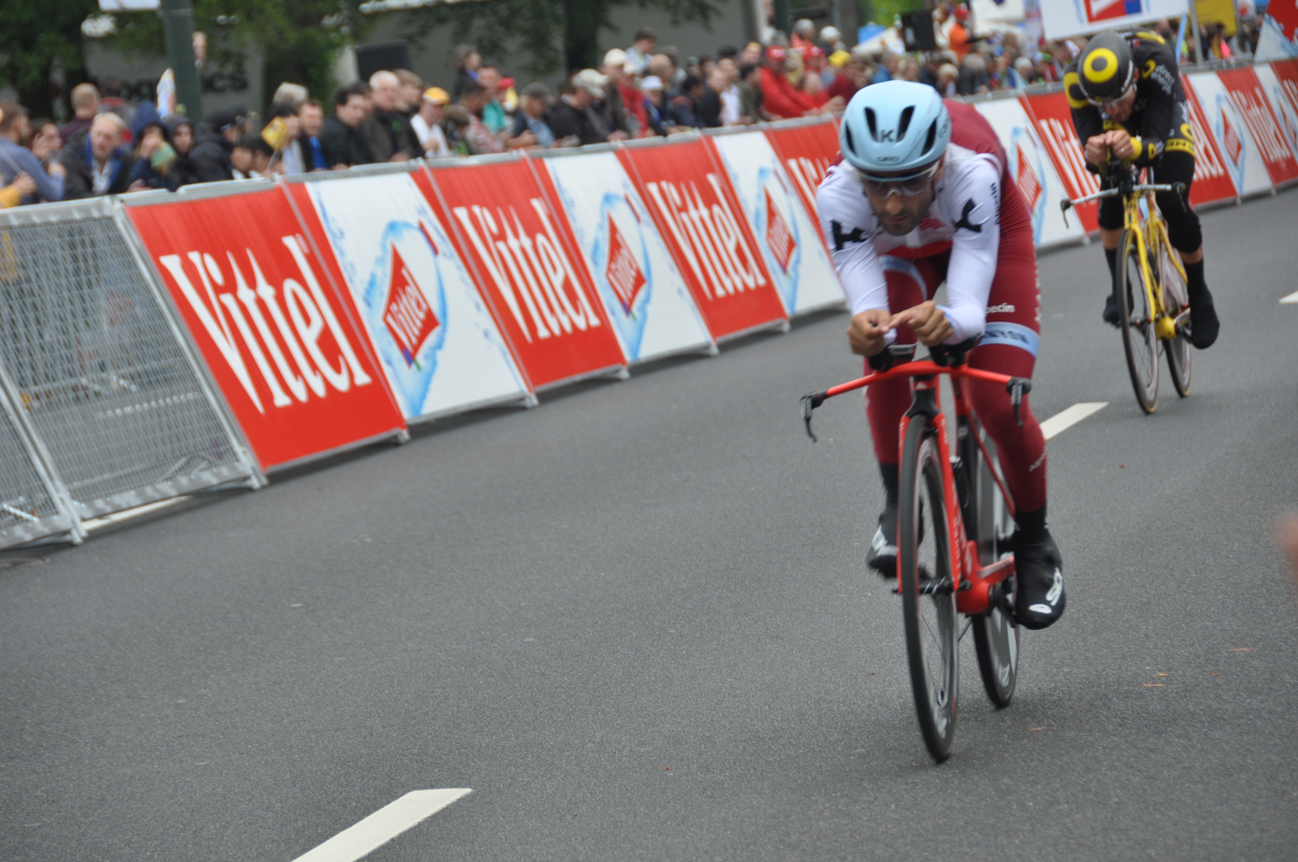 Training kurz vor dem Rennen